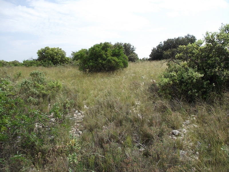 Pelouse calcicole Malmont (Draguignan, Var, France)